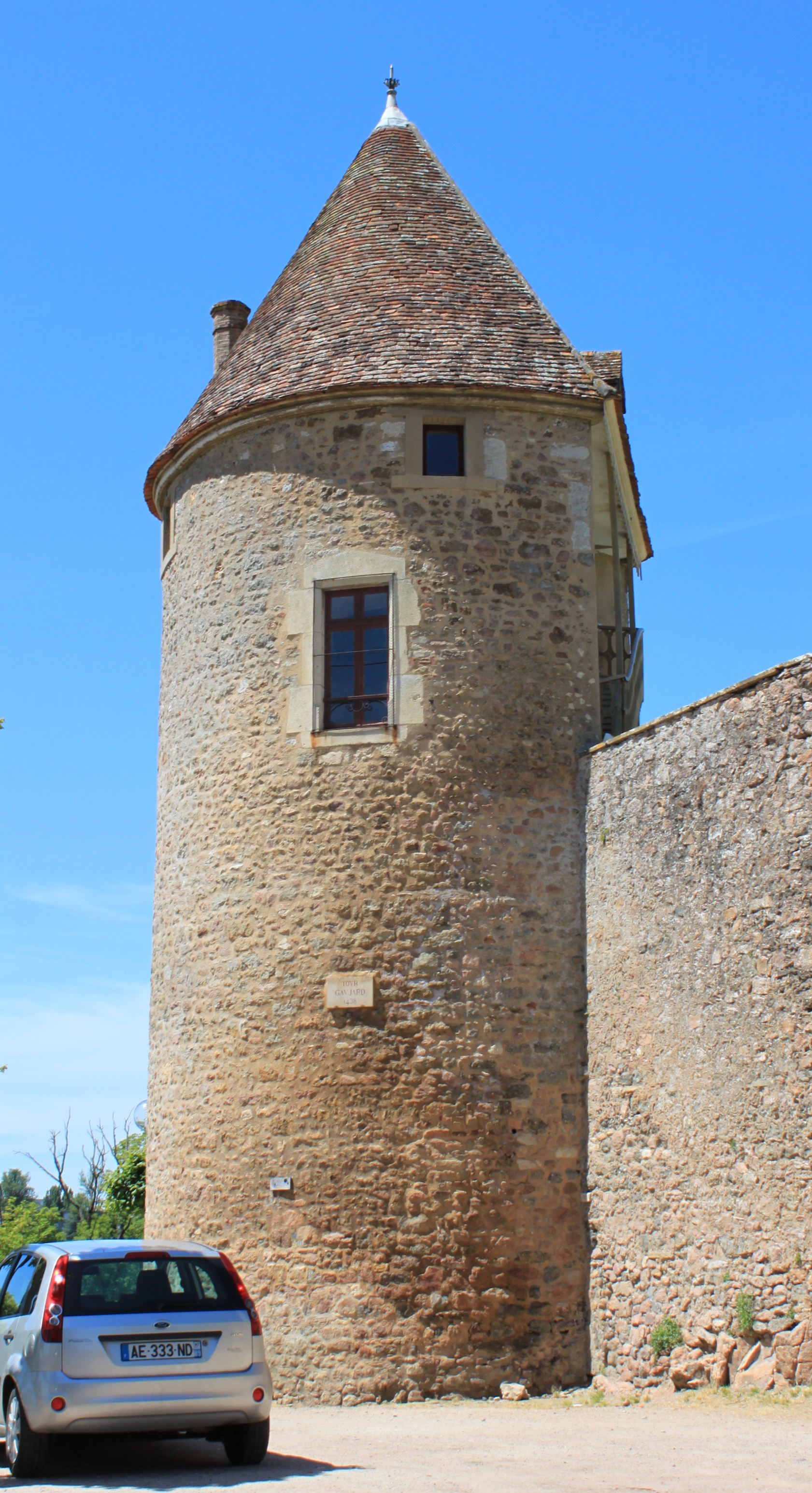 Tour Gaujard construite en 1438 (Avallon, Yonne, Bourgogne-Farnche-Comté, France).